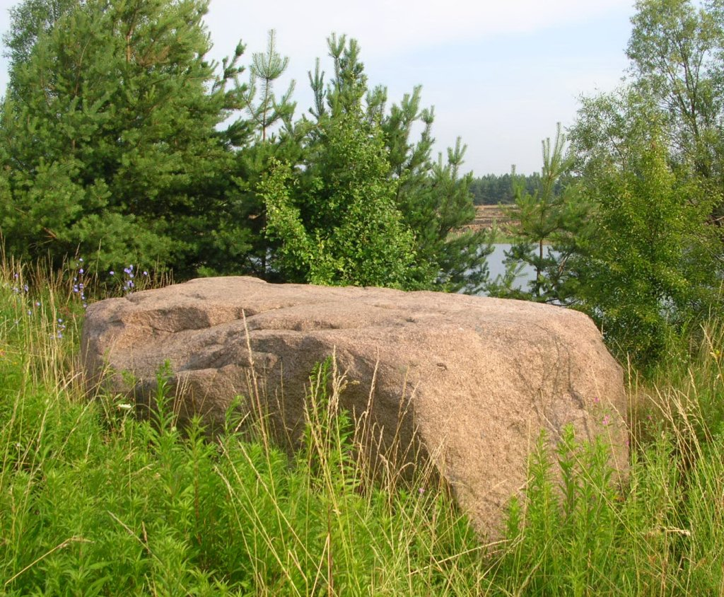 Głaz narzutowy "Wojciech" nad glinanką w Fordonie - pomnik przyrody